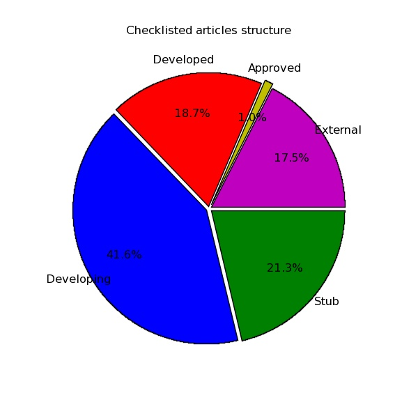 Чӑвашла: Citizendium статьисен тытăмĕ.